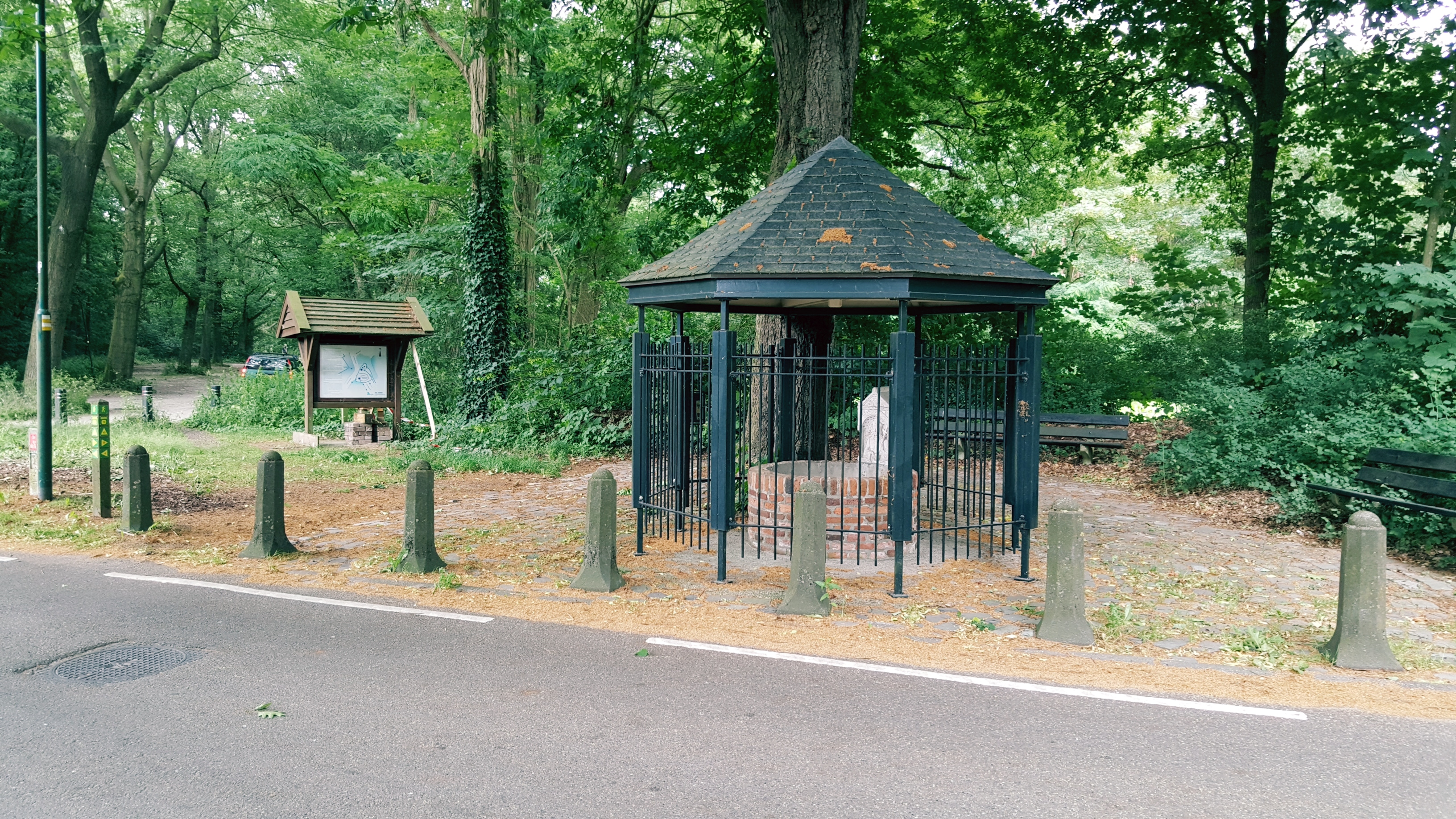 Gemeentelijk monument, Willibrordusputje Oss, Willibrordusweg Oss